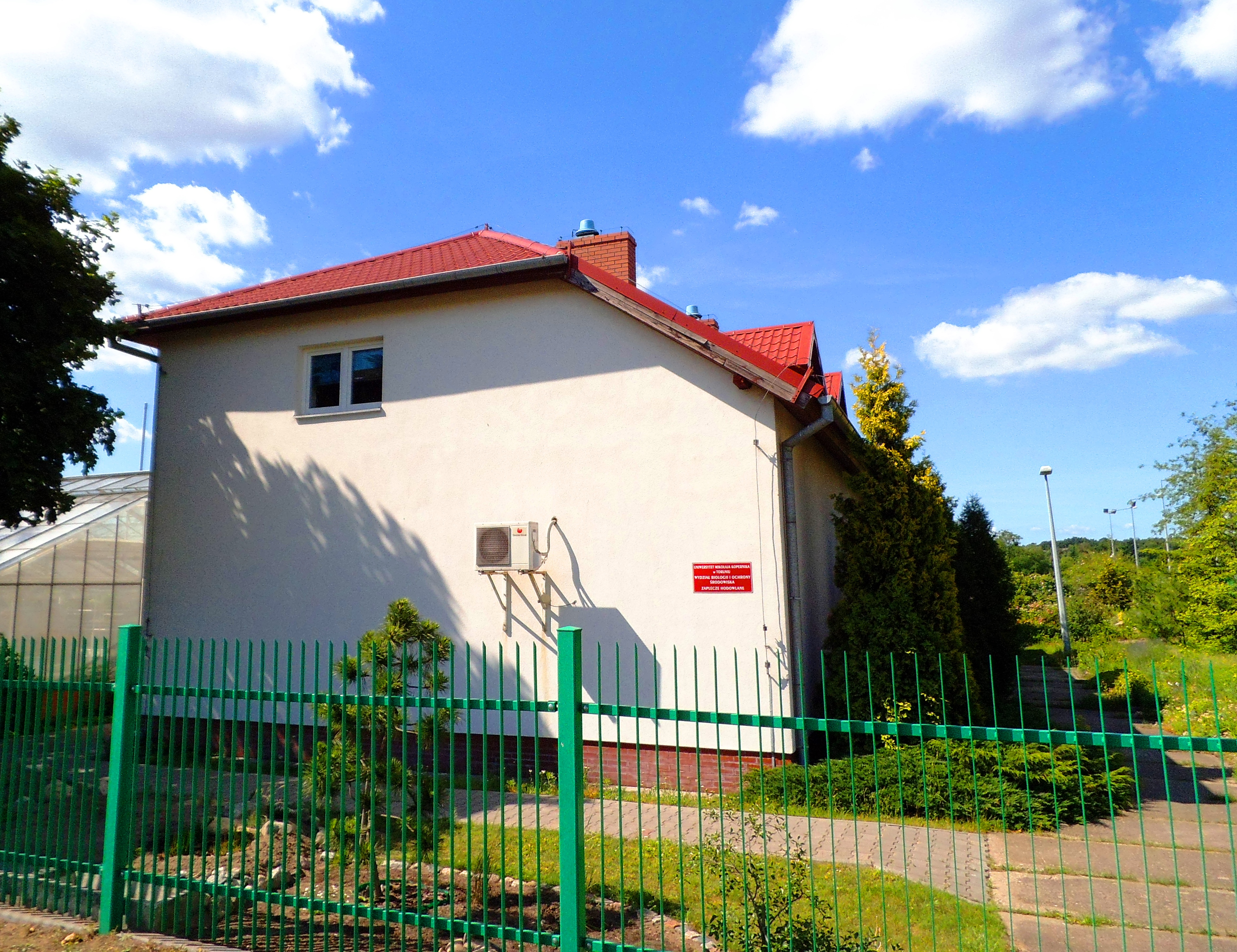 Zaplecze Hodowlane UMK w Toruniu1